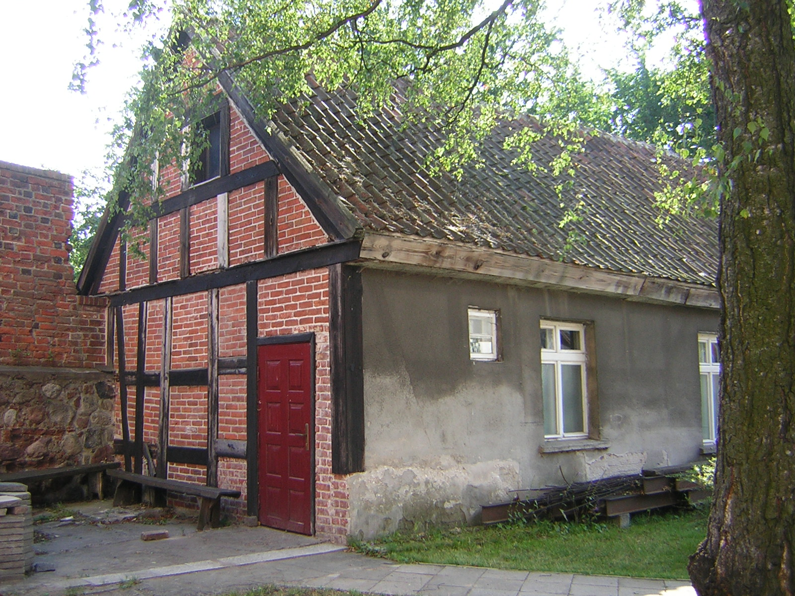 Plebania z XVII w. przy Kościele Przemienienia Pańskiego w Iławie (fragment}